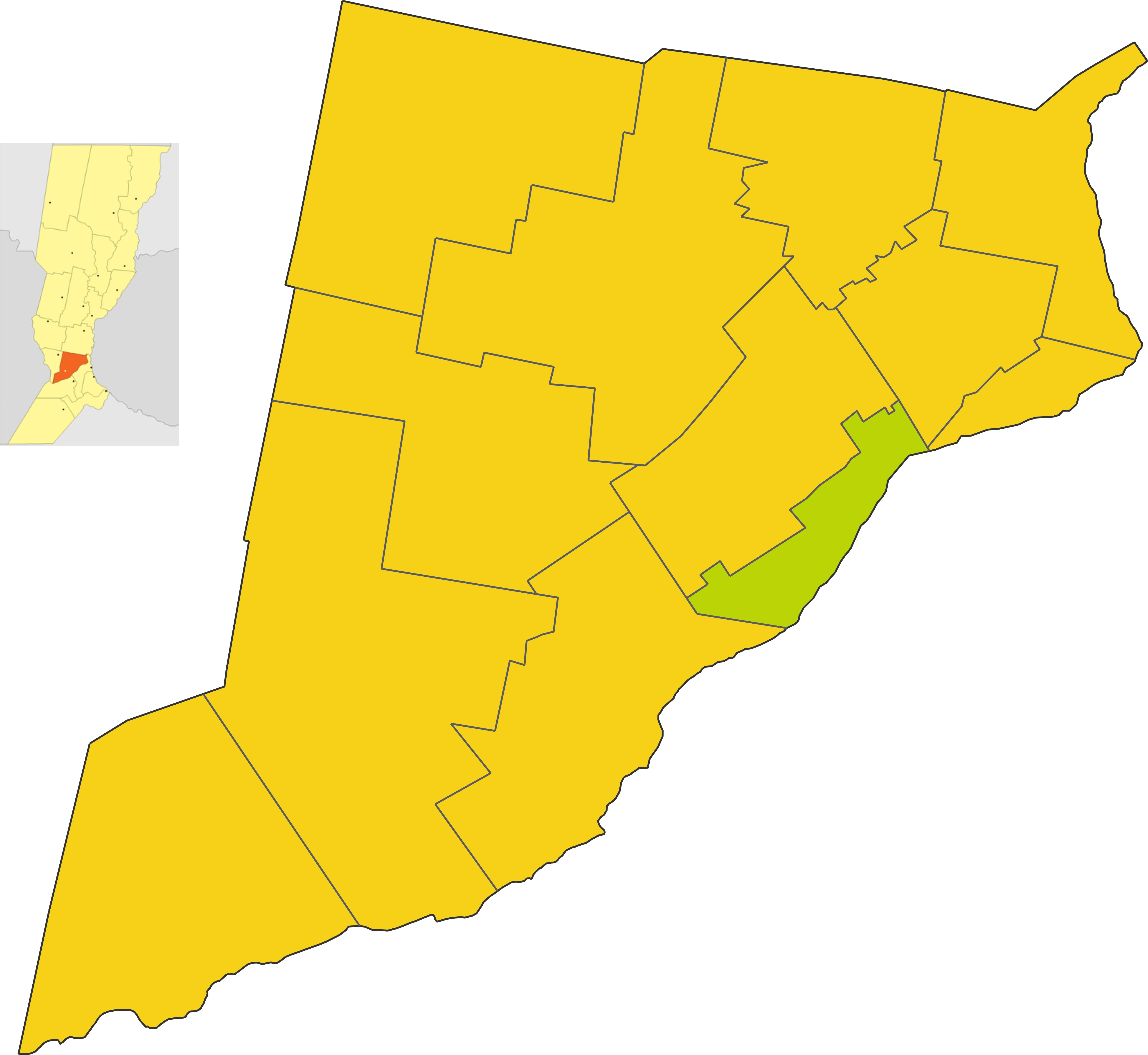 Map of the comuna de Lucio V Lopez in Iriondo department, Santa Fe province, Argentina